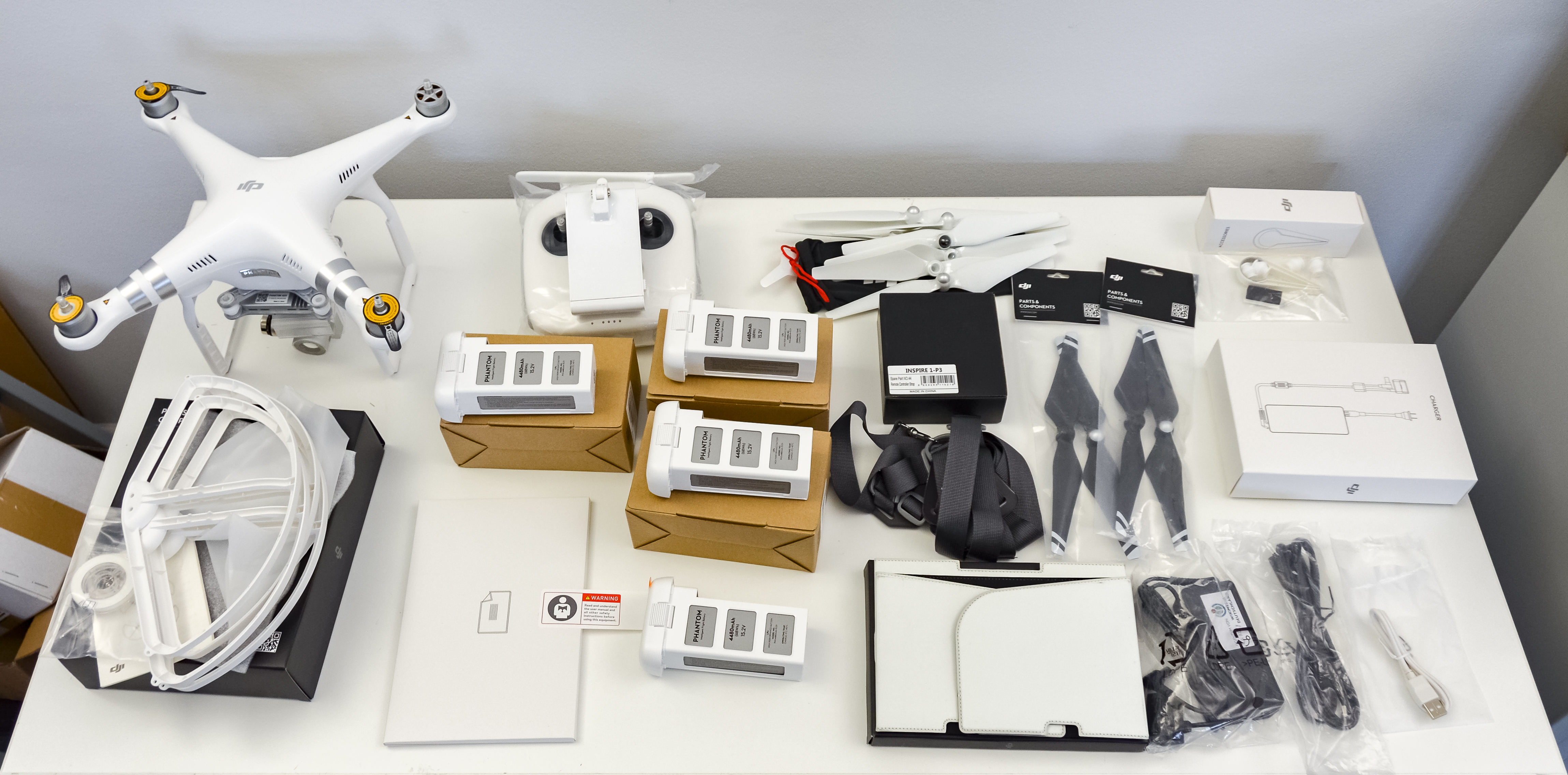 Ausstattung der Dji Phantom III Advanced Drohne.